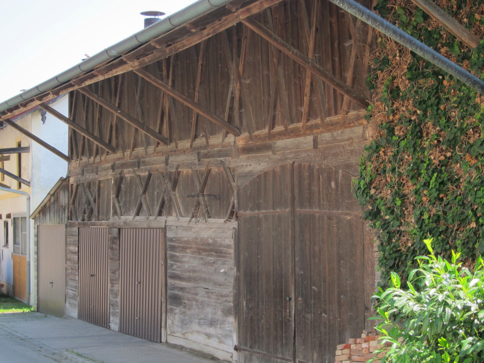 Obergeislbach 20; Stadel, Ständerbau mit Bohlenwänden, Satteldach und zweigeteilter Bundwerkzone, um Mitte 19. Jahrhundert.